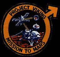 Tagalog: Viking Mission Patch Image:Patch-Viking.jpg